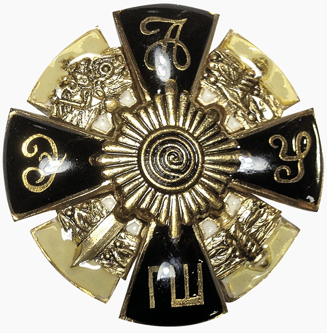 Нагрудный знак «Экспертно-аналитическое управление Генерального штаба ВС РФ»